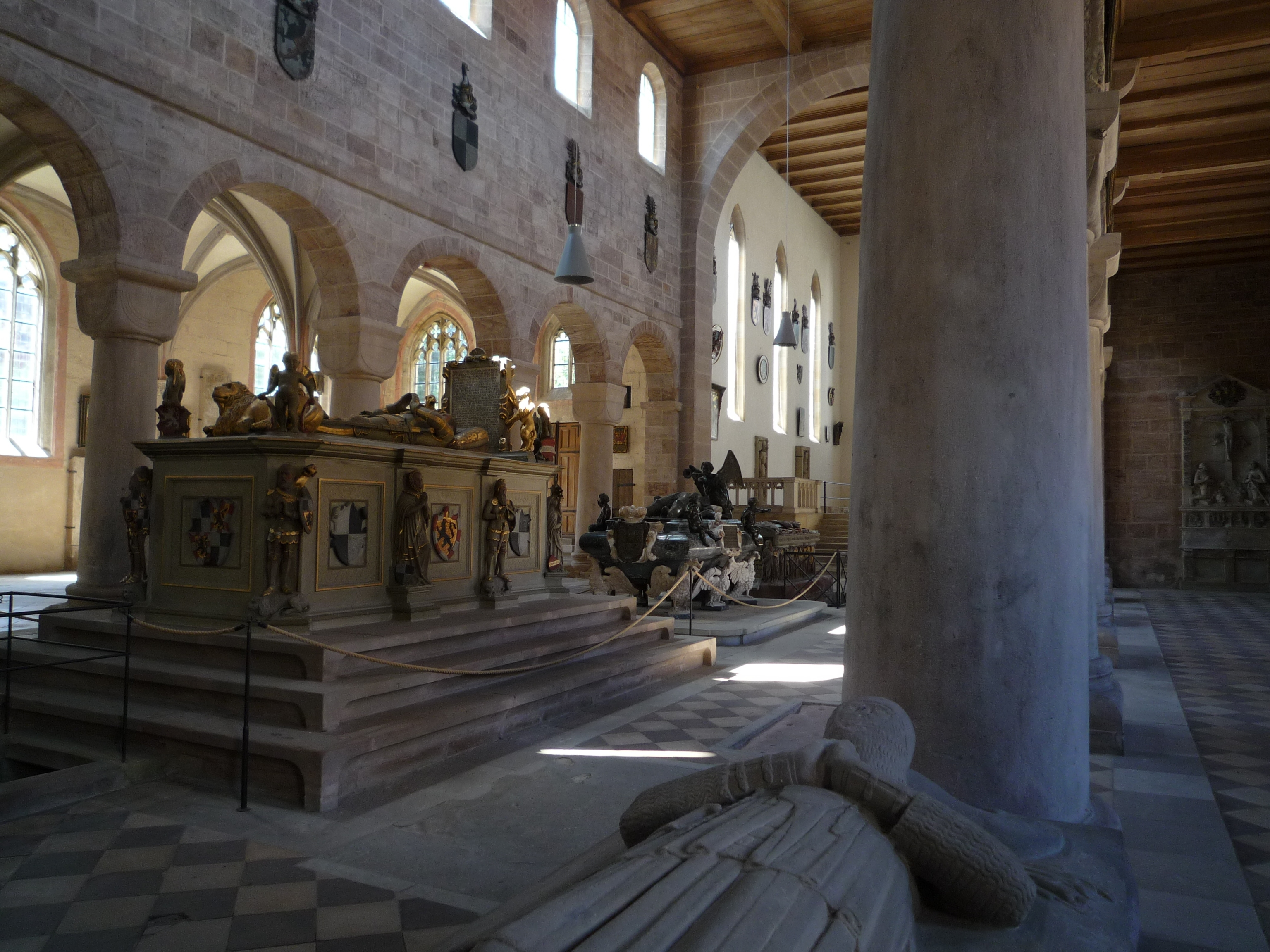 Grablege im romanischen Hauptschiff der Klosterkirche in Heilsbronn